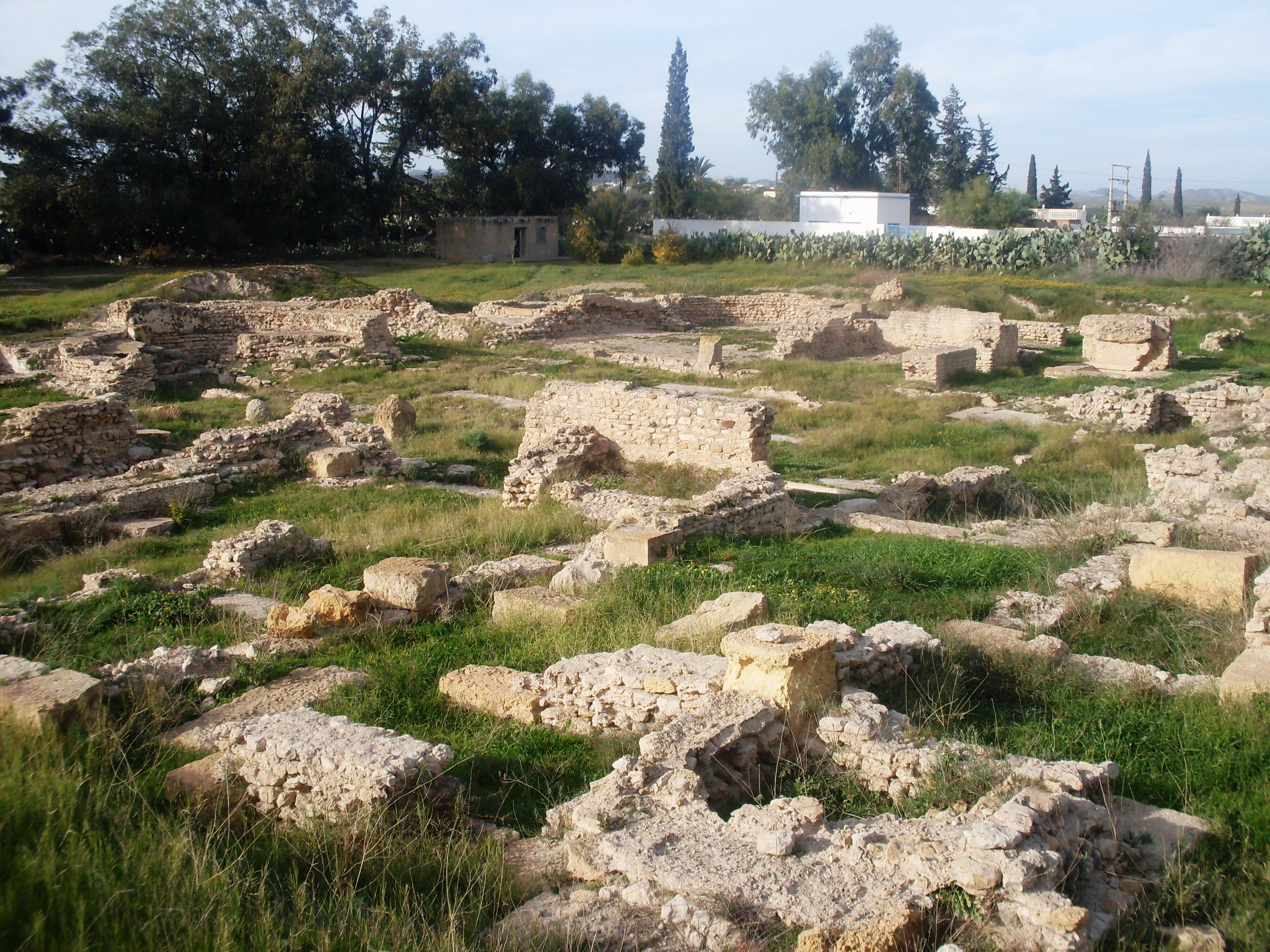 Site archéologique d'Uppenna dans les environ d'Enfida